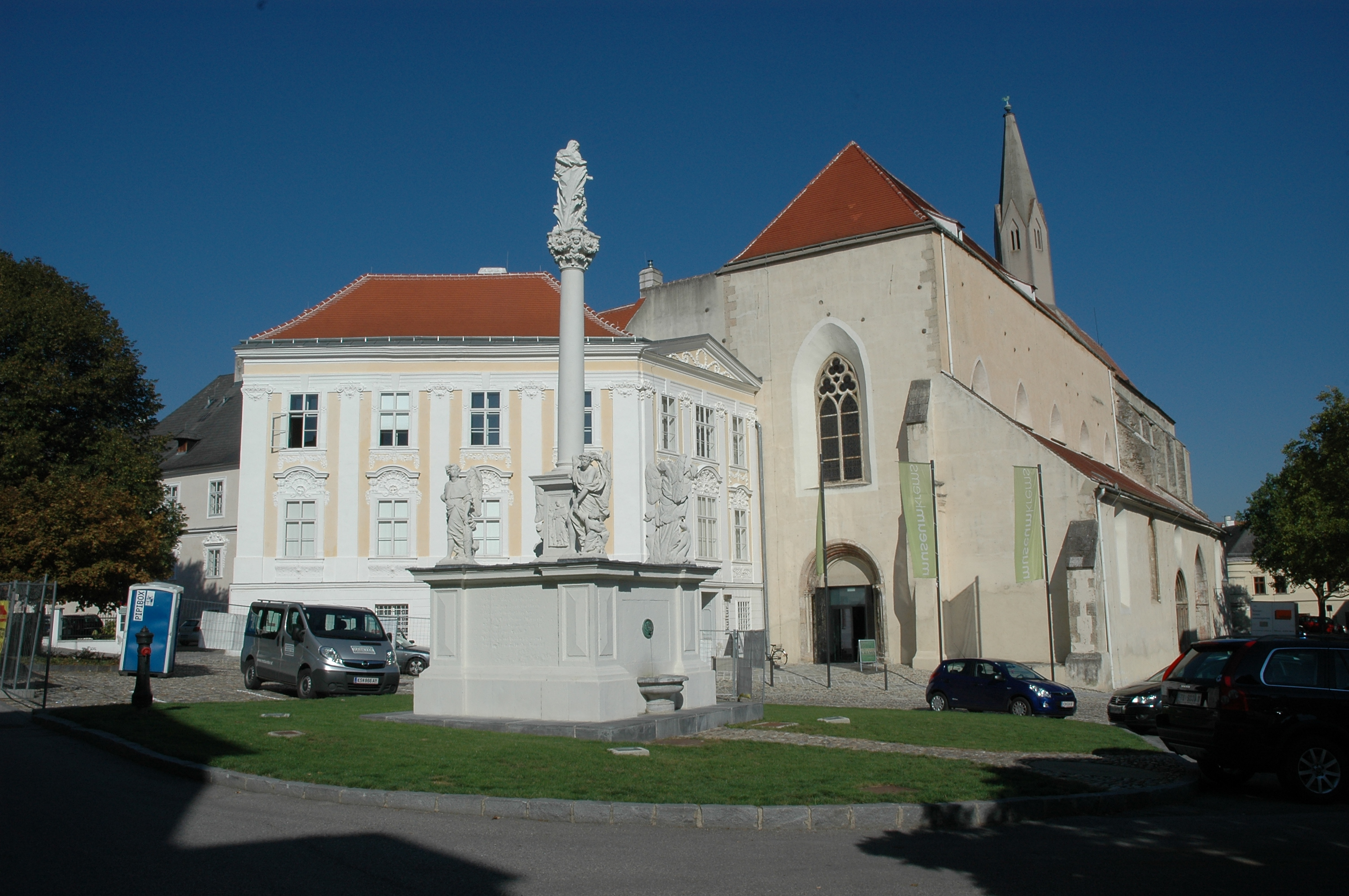 Dominikanerkirche, heute Museum d Stadt Krems